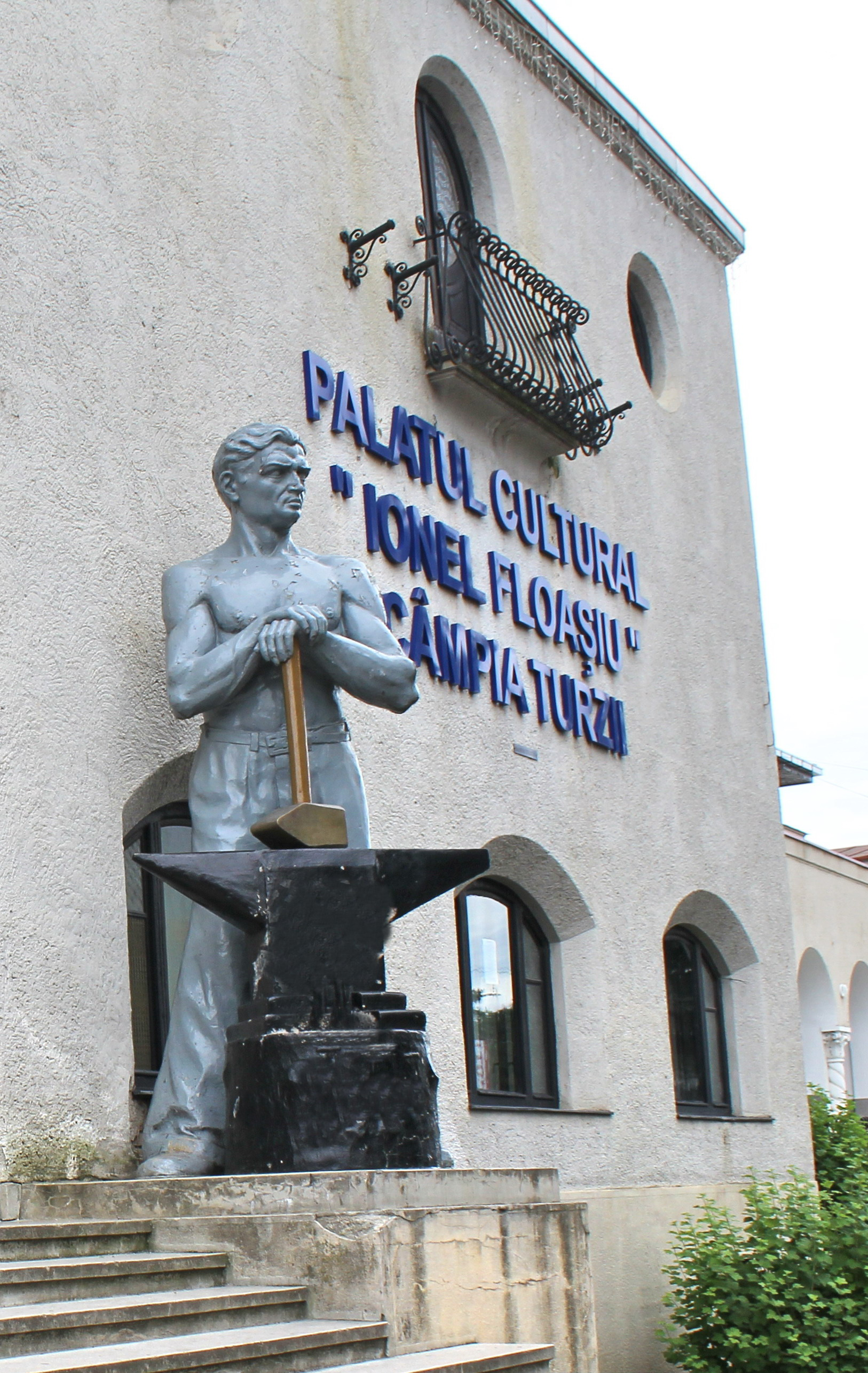 Numele purtat de edificiul cultural după 2012: “Palatul de Cultură Ionel Floaşiu”